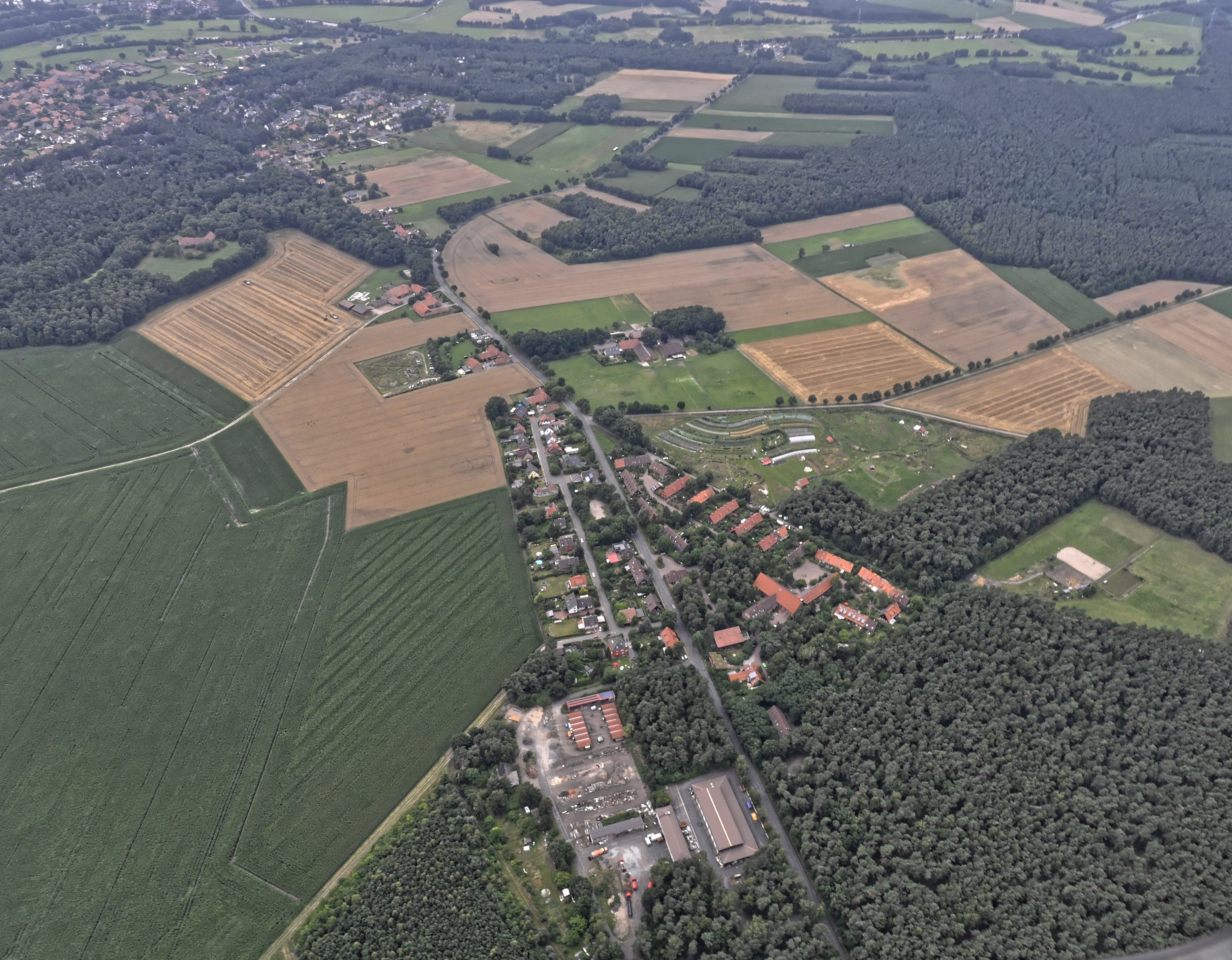 Bilder vom Flug Nordholz-Hammelburg 2015: Blick von Norden auf Steyerberg (links oben) und die Siedlung am Borsteler Weg mit dem "Lebensgarten Steyerberg" (vorn).